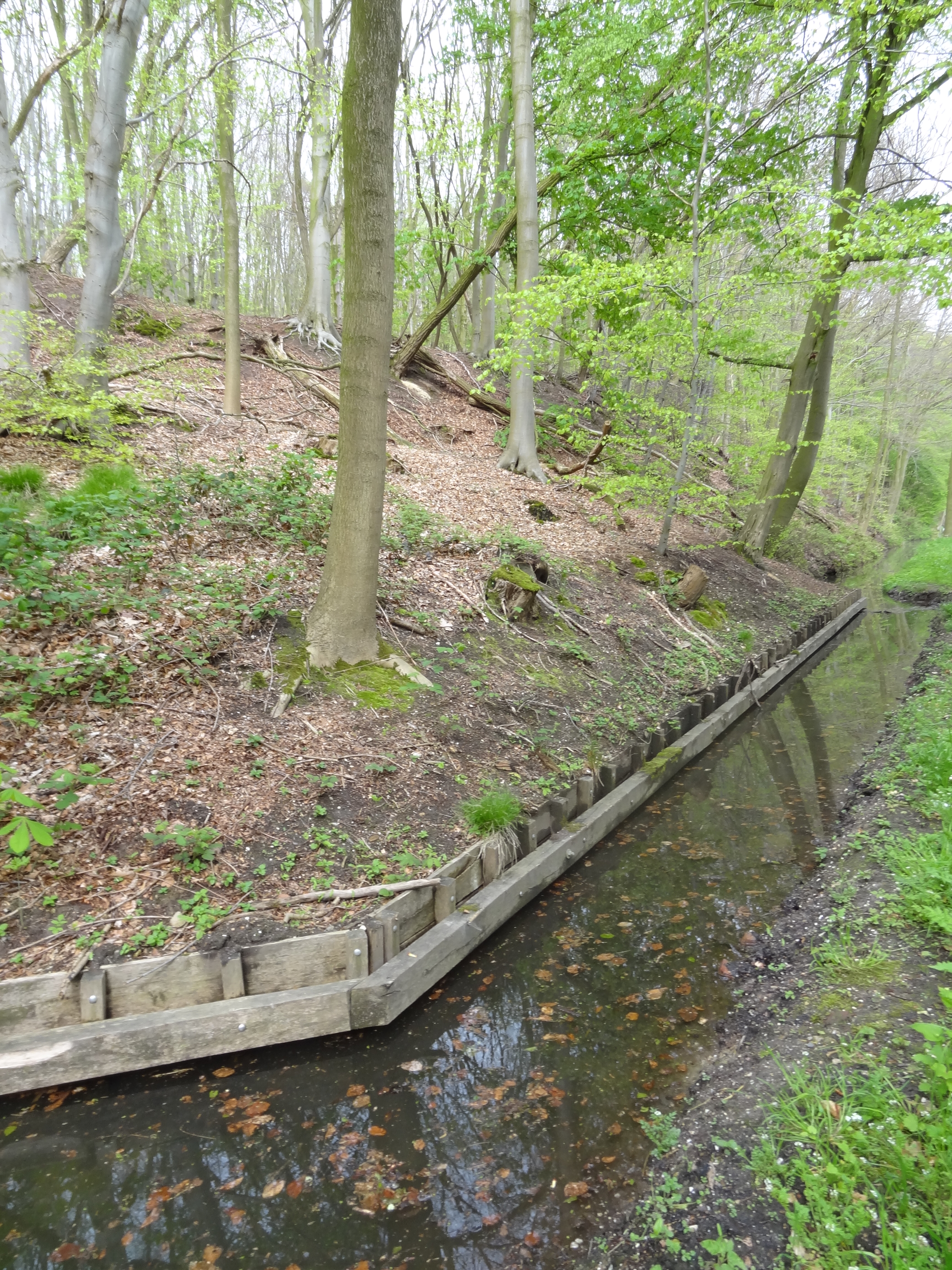 Oeverbescherming aan de zuidzijde van landgoed Duno